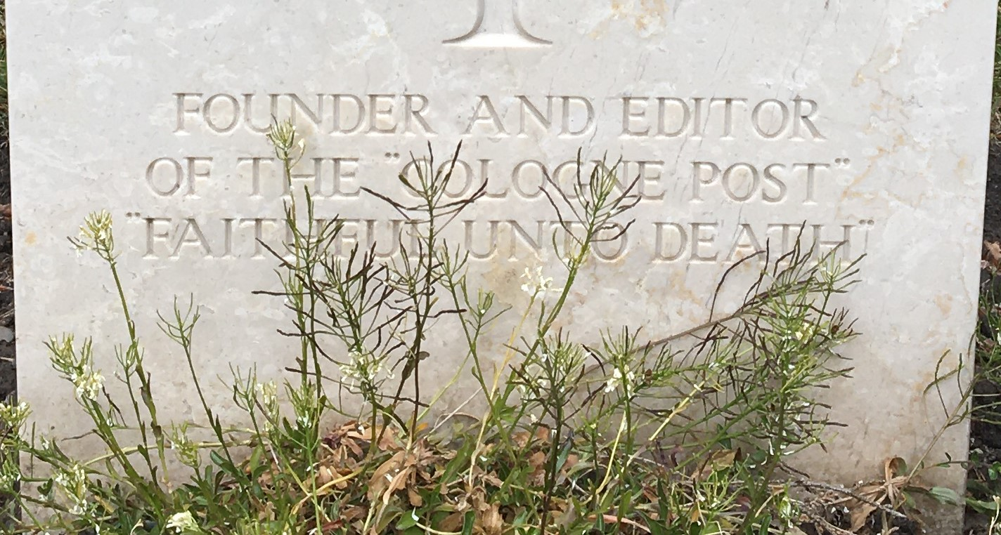 Inschrift auf dem Grab von Rolsten auf dem Kölner Südfriedhof im Commonwealth-Ehrenfriedhof. Die Grabinschrift lautet: FOUNDER AND EDITOR OF THE "COLOGNE POST" "FAITHFUL UNTO DEATH".